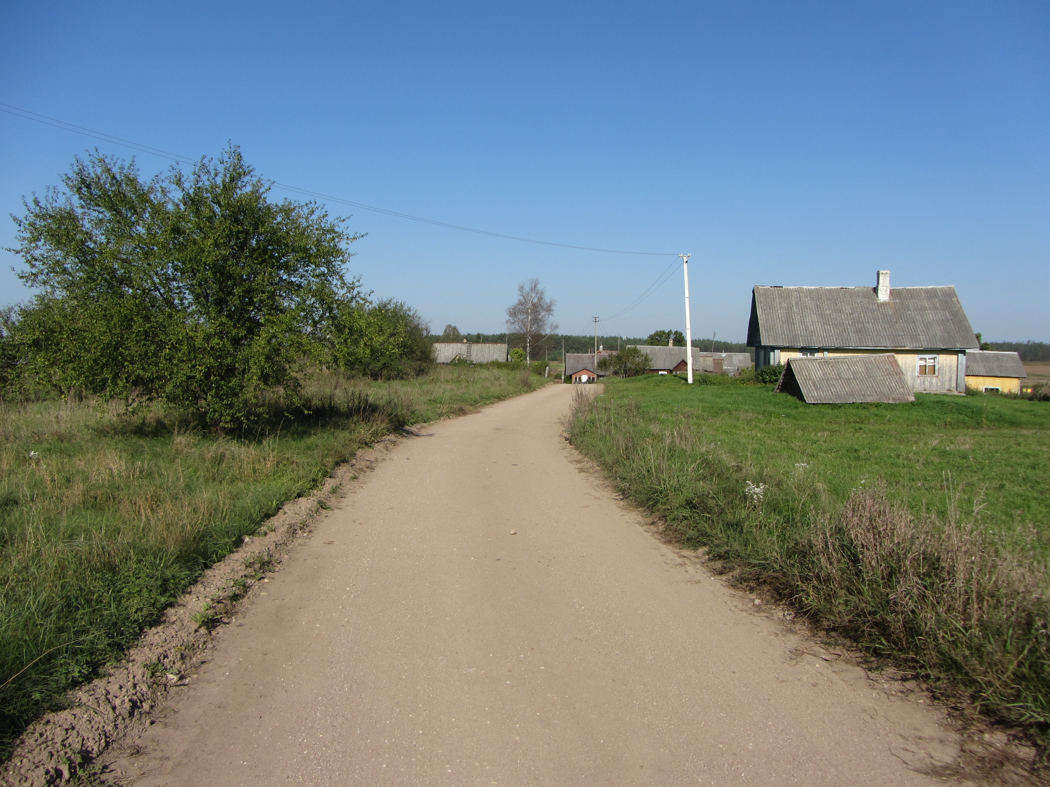 Slabada 21170, Lithuania